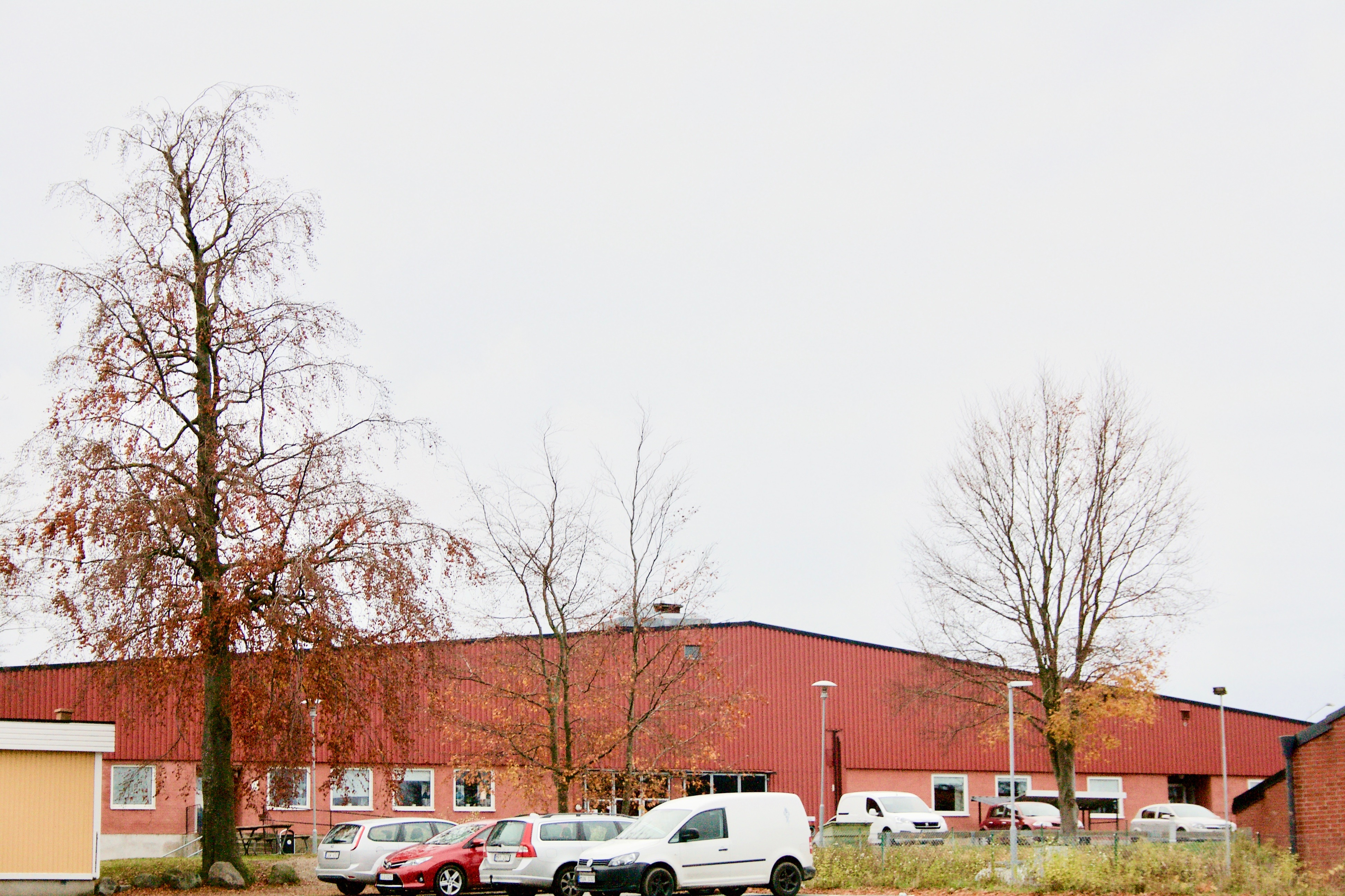 Tekniskt Lärcentrum, del av Furulundsskolan sätt från Svarta Leds entré